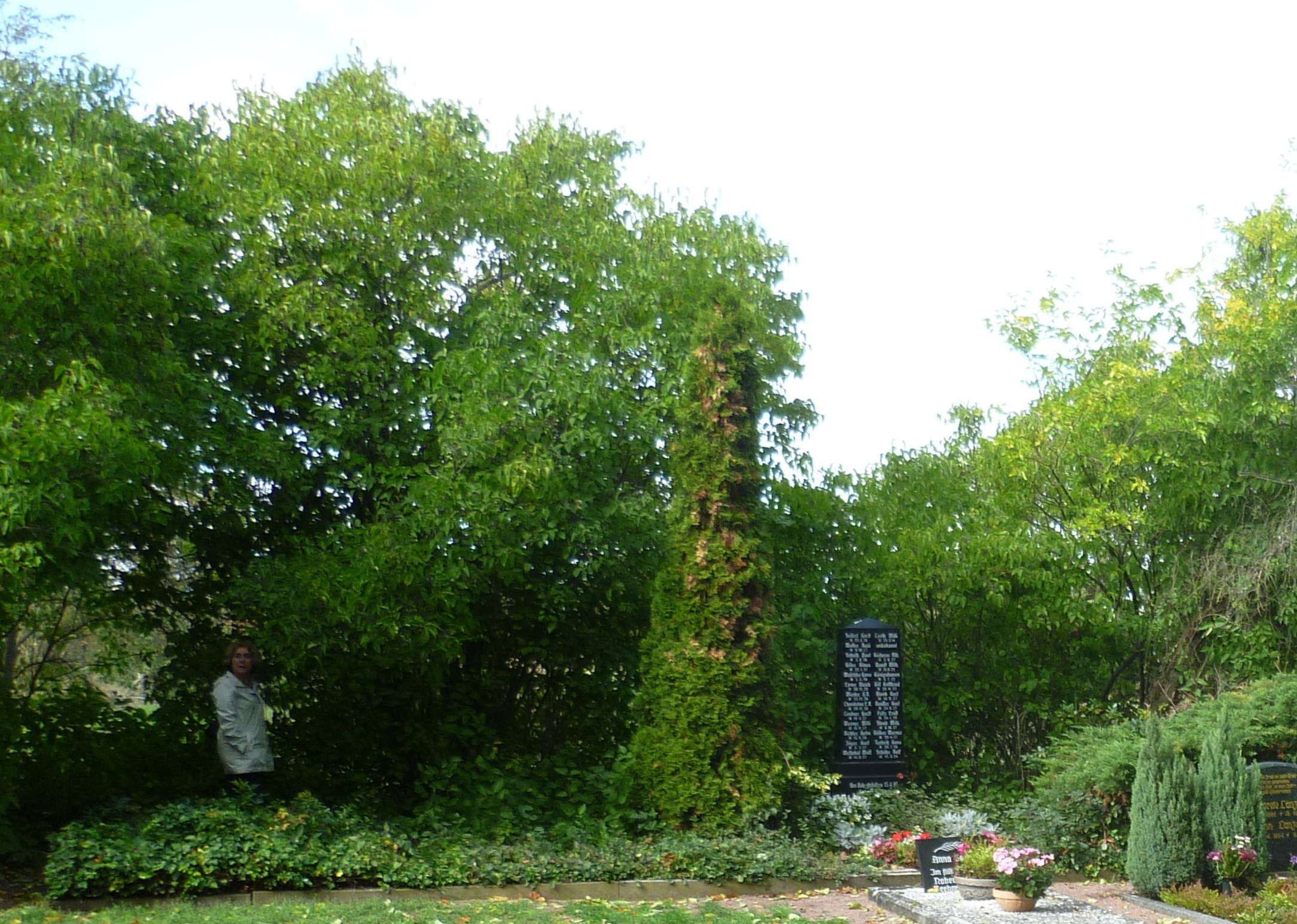 Großpaschleben Friedhof: Kriegsgrab für 26 gefallene Soldaten 15. April 1945 (Oktober 2019)